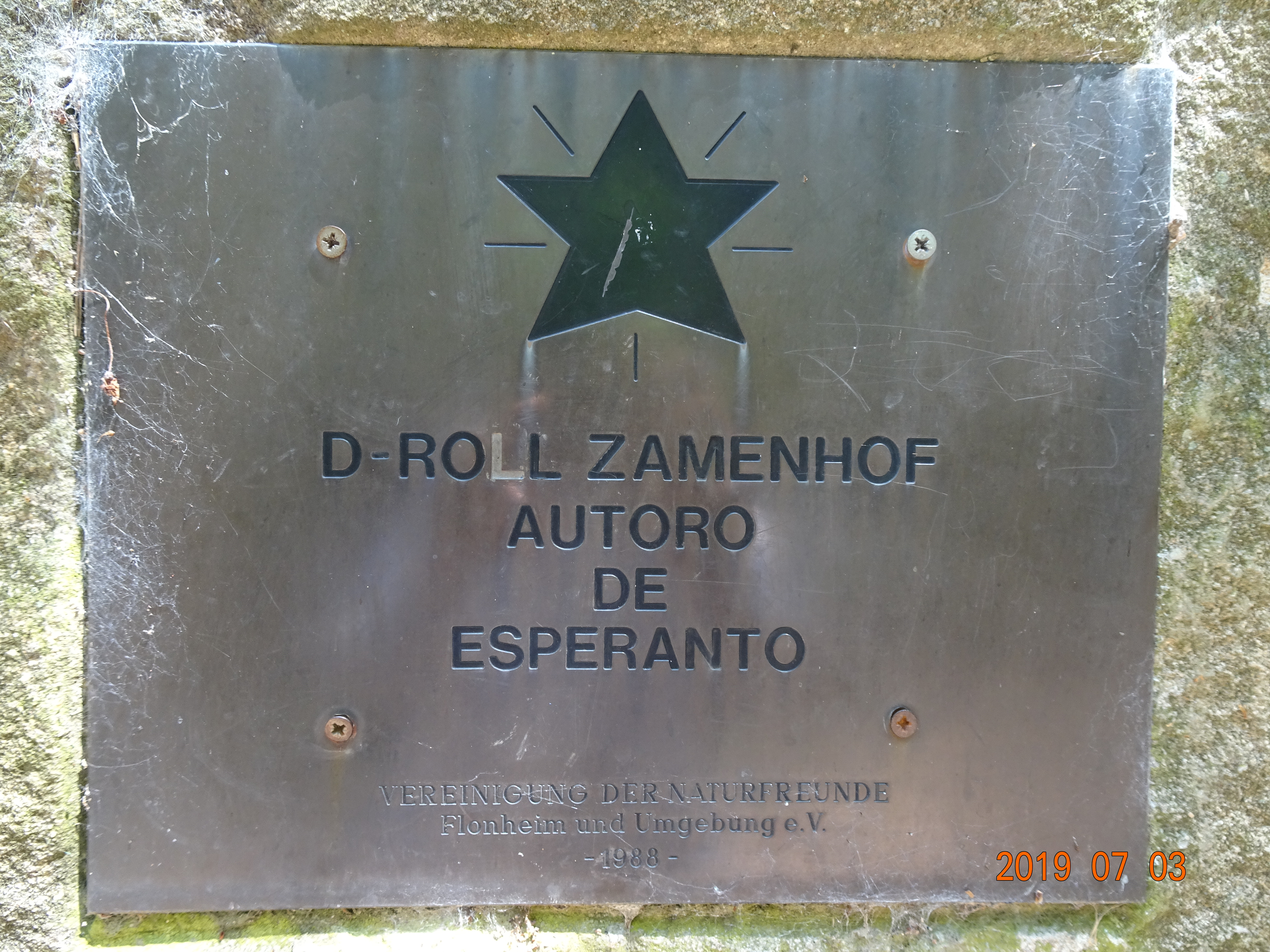 Tiu tabulo trovigxas sur la Zamenhof-monumento en Flonheim, Germanio